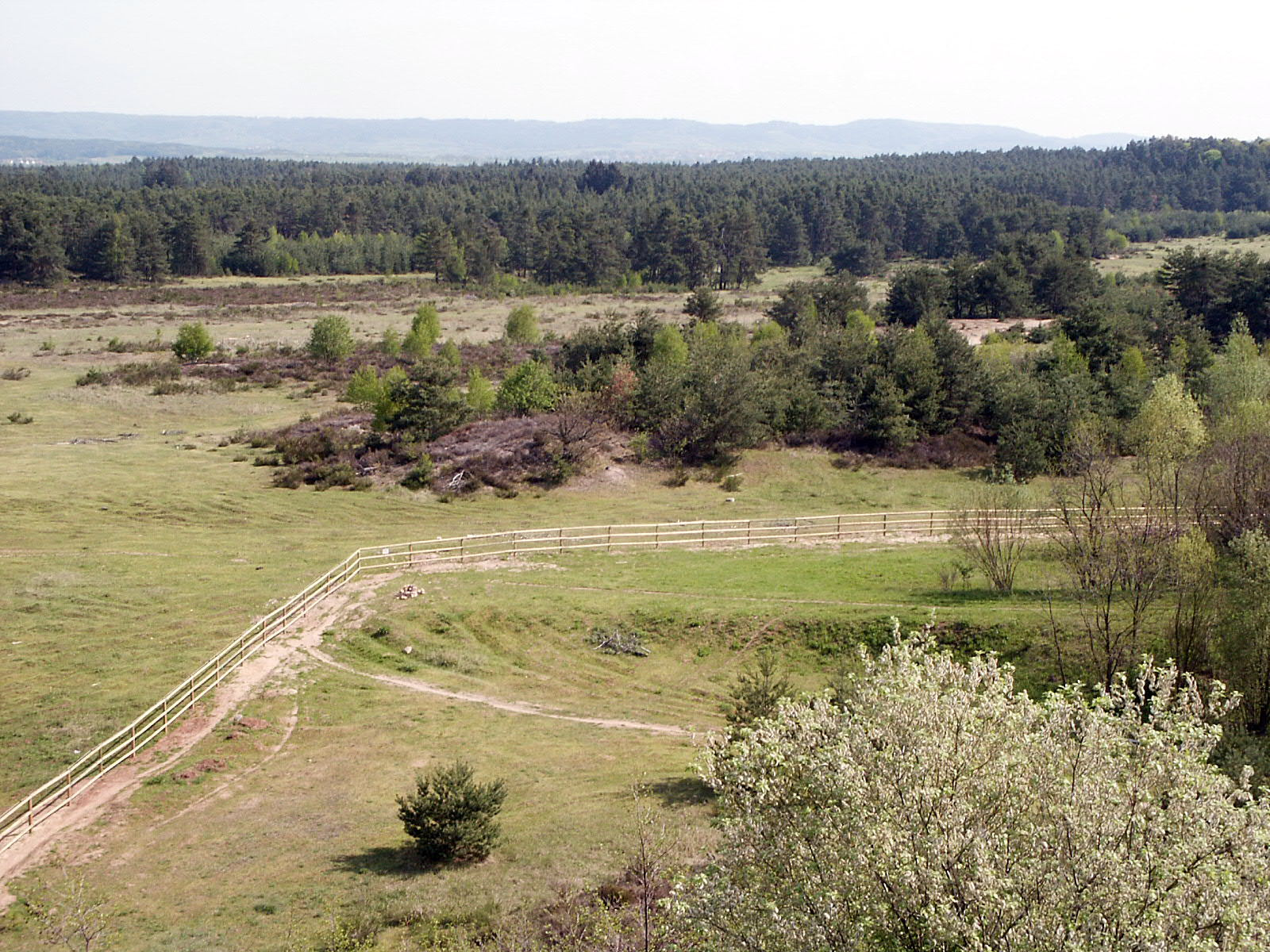 Naturschutzgebiet Tennenloher Forst: Zaunverlauf des Wildpferdegeheges.